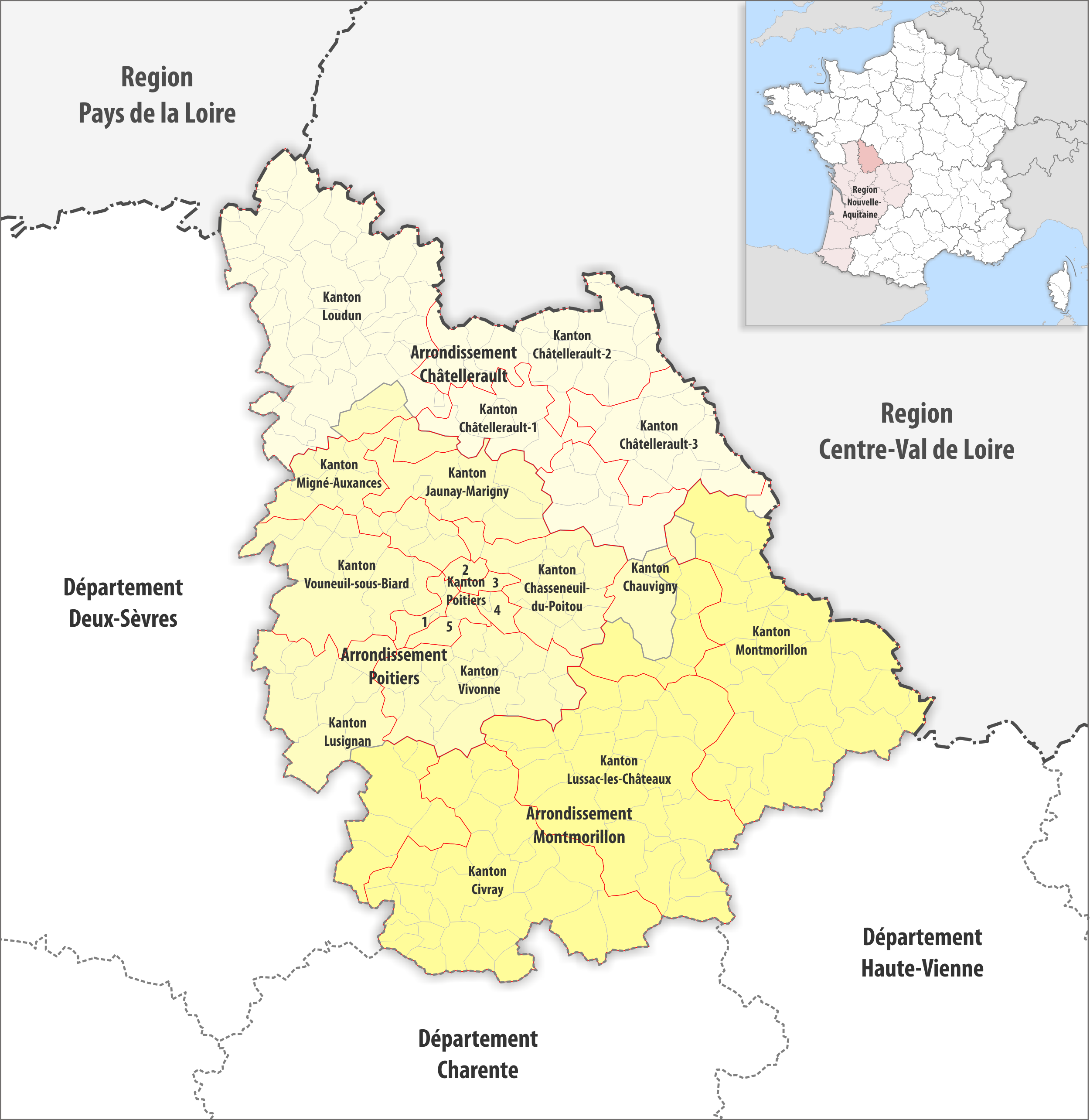 Gemeinden, Kantone und Arrondissemente im Departement Vienne